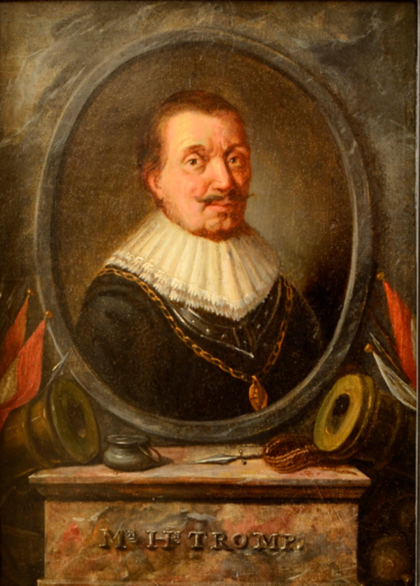 Portret van Maarten H. Tromp / anoniem. Schilderij, olieverf op paneel met het portret van Maarten Harpertszoon Tromp in medaillon. Portret ten halve lijve, lichaam en hoofd naar links gedraaid, kijkt beschouwer en face aan. Man draagt een donkere mantel met daarover een borstschild en een hoge witte kraag. Over zijn mantel een brede schakelketting met daaraan een decoratie en/of onderscheiding. Man heeft kort haar en draagt een snor. Onderkant medaillon omringd met oorlogsattributen. Portret tegen een marmeren achtergrond. Onder medaillon een opschrift. Schilderij is ongesigneerd en zit in een zwarte, geprofileerde lijst. Hoogte: 28 cm (drager) ; breedte: 20.6 cm (drager) ; hoogte: 35.6 cm (geheel) ; breedte: 28 cm (geheel) ; diepte: 2.5 cm (geheel). Object number Historisch Museum Den Brielː B0064